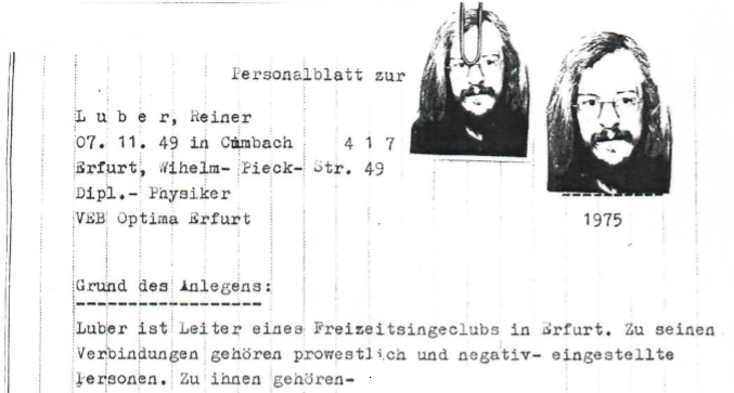 Freizeitsingeclub als Grundlage für die Stasi-Überwachung